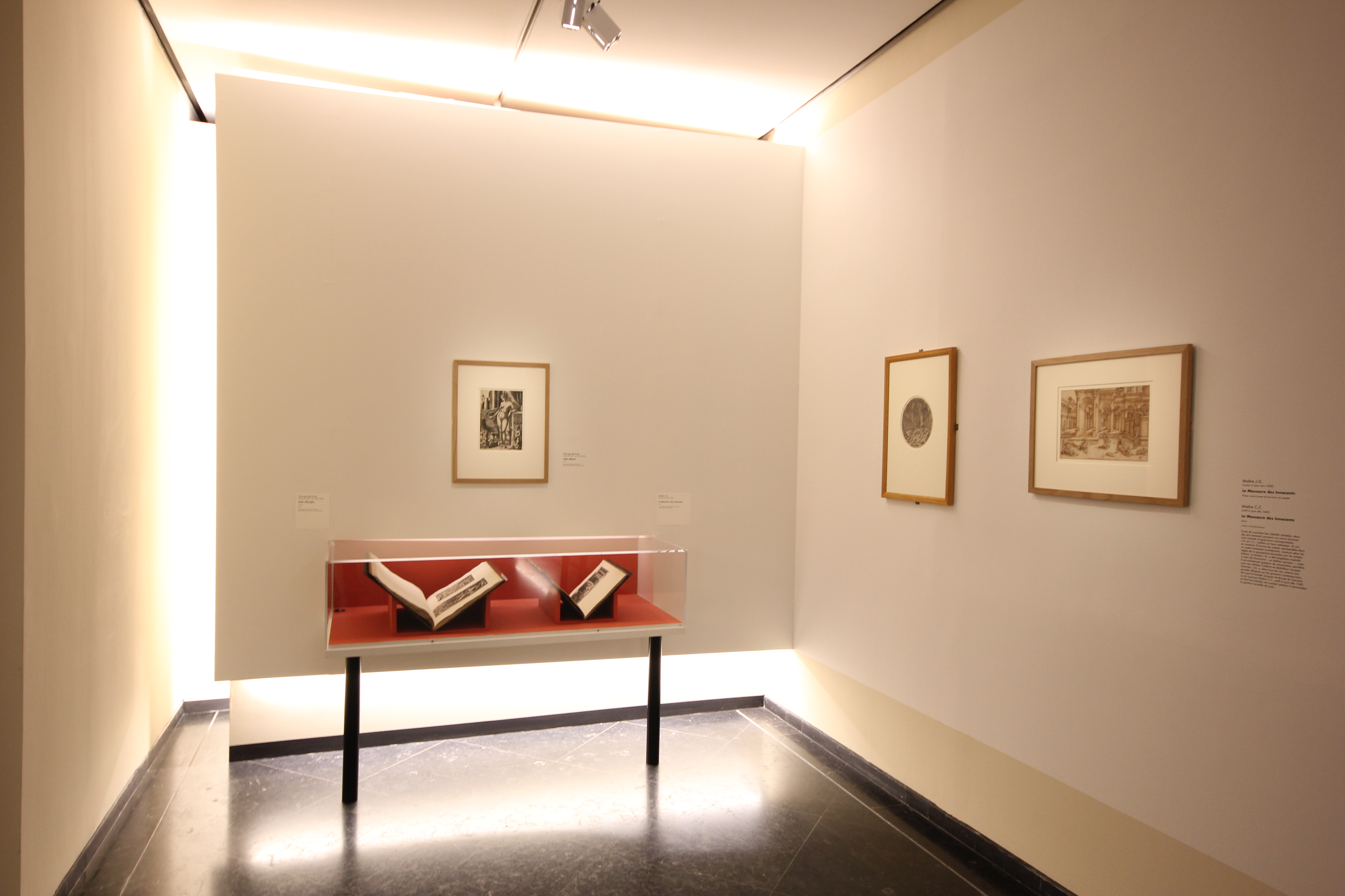 Musée des Beaux-Arts de Lyon - Exposition Lyon Renaissance - Vue des salles